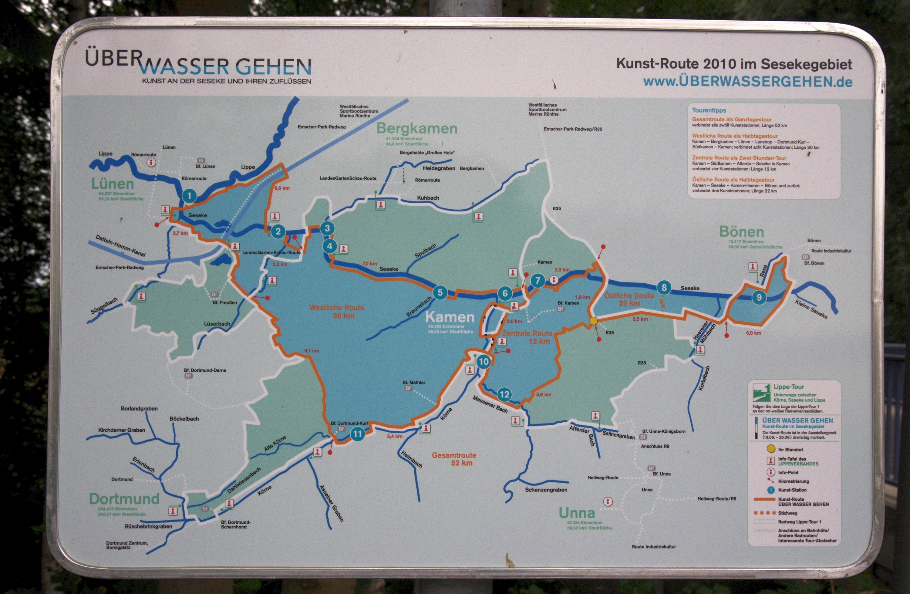 Infotafel Ruhr.2010 ÜberWasserGehen